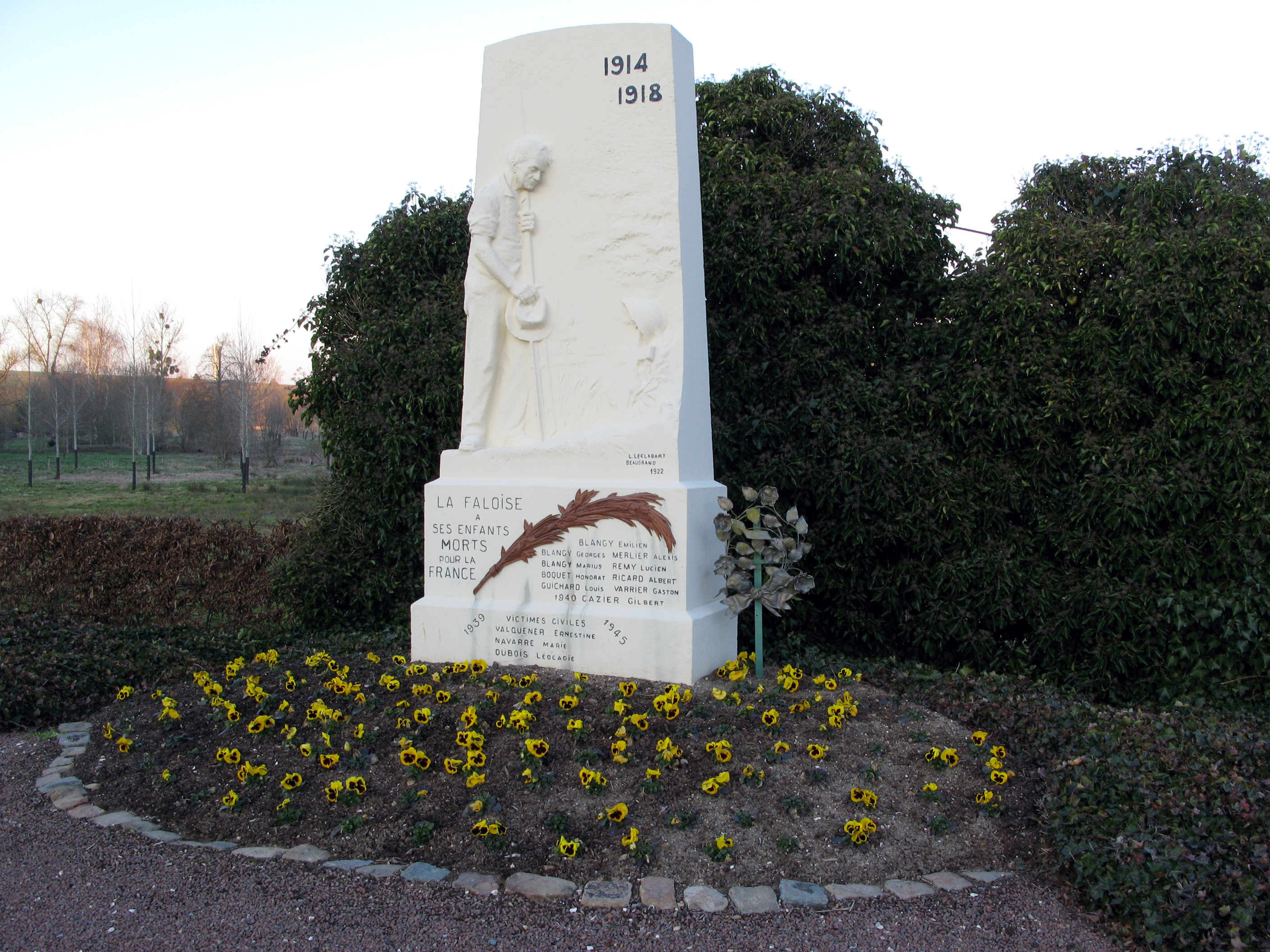 La Faloise (Somme, France) - Le Monument-aux-morts est un peu à l'écart, peu avant l'entrée dans le village par la route venant de Folleville. . .